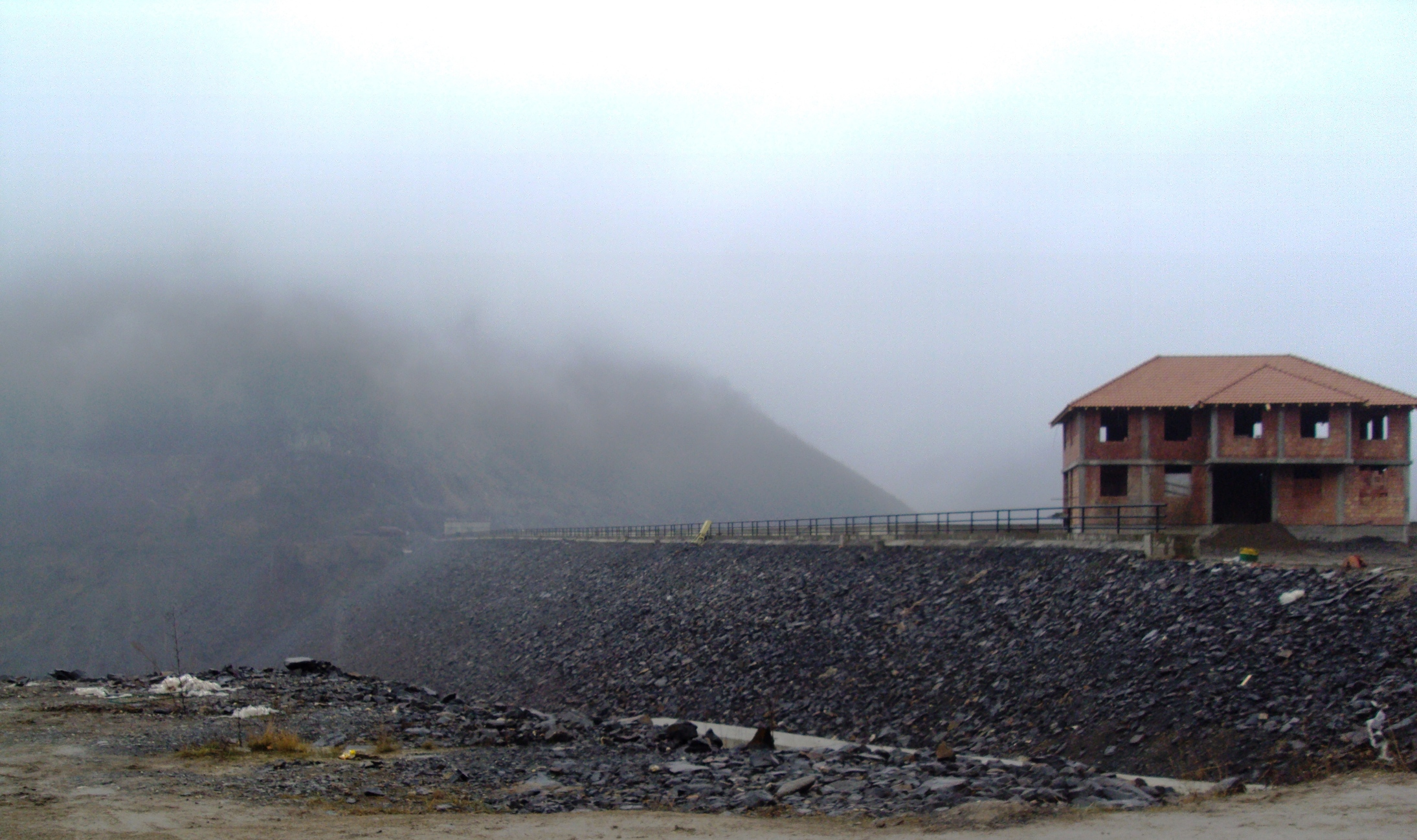 Брана у Селови, Куршумлија